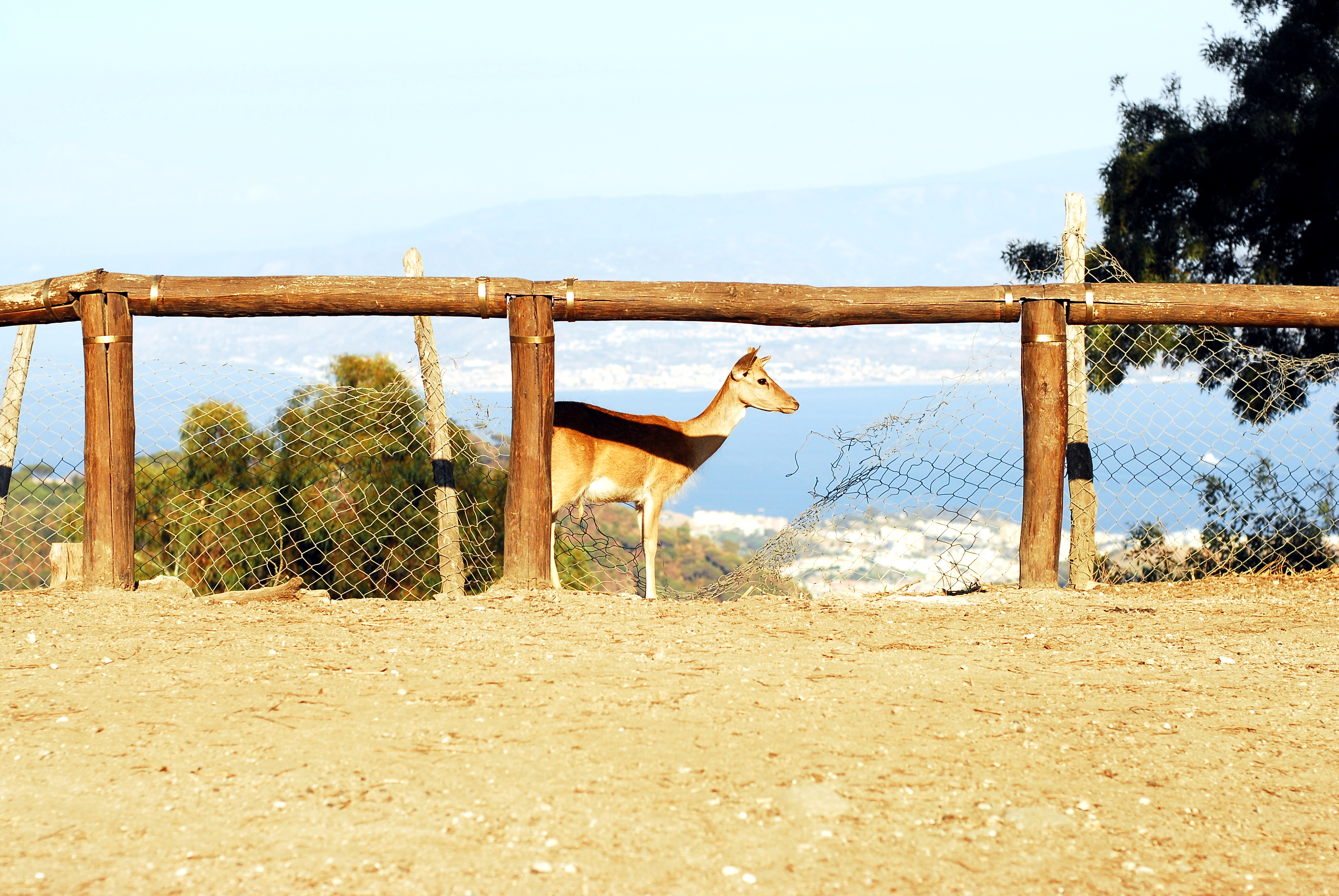 Un daino al Forte Puntal Ferraro. Sullo sfondo, lo stretto e la Calabria